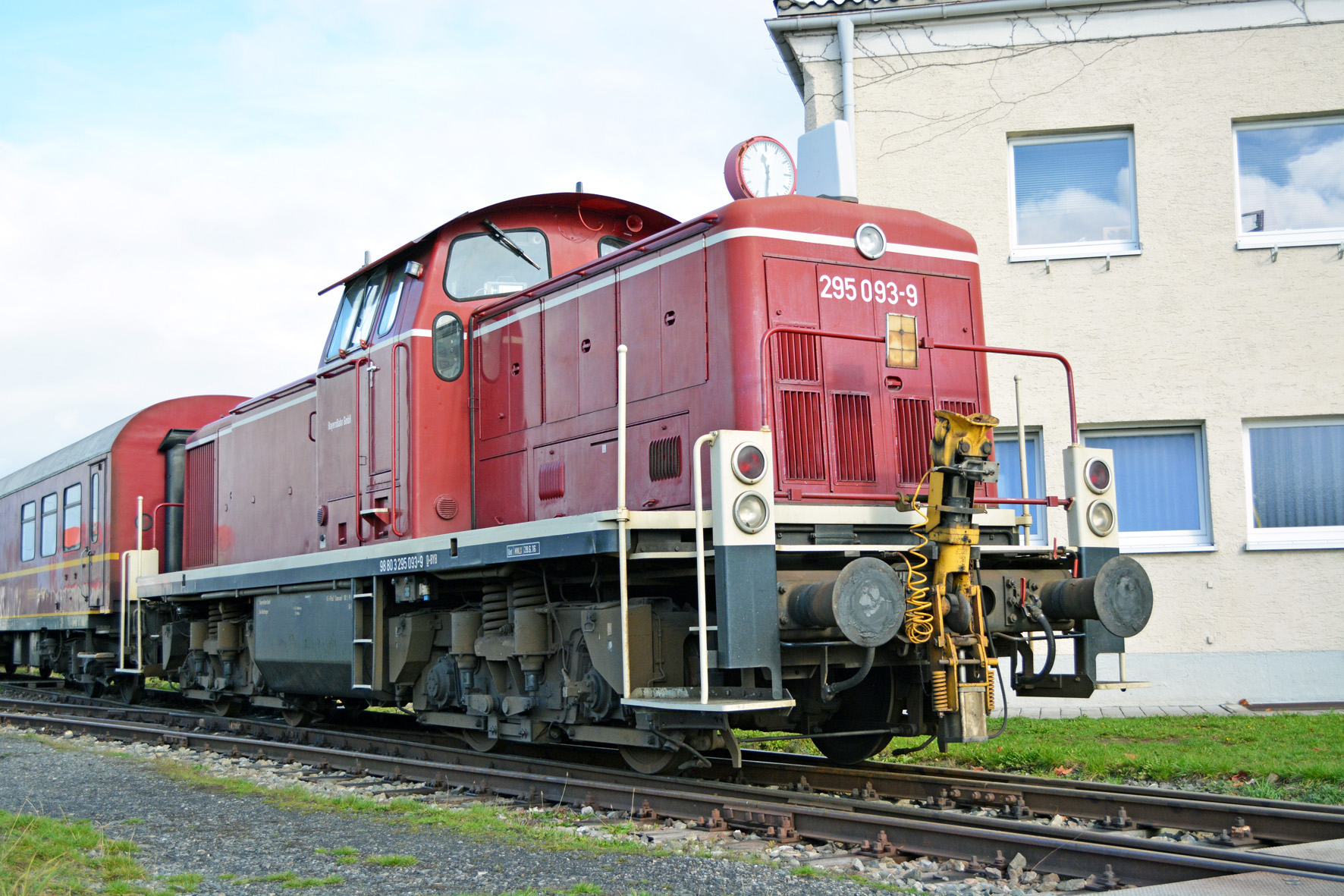 DB-Baureihe V 90 Lok 295 093-9 am 02.11.2019 in Nördlingen